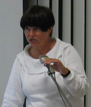 Kevät Nousiainen